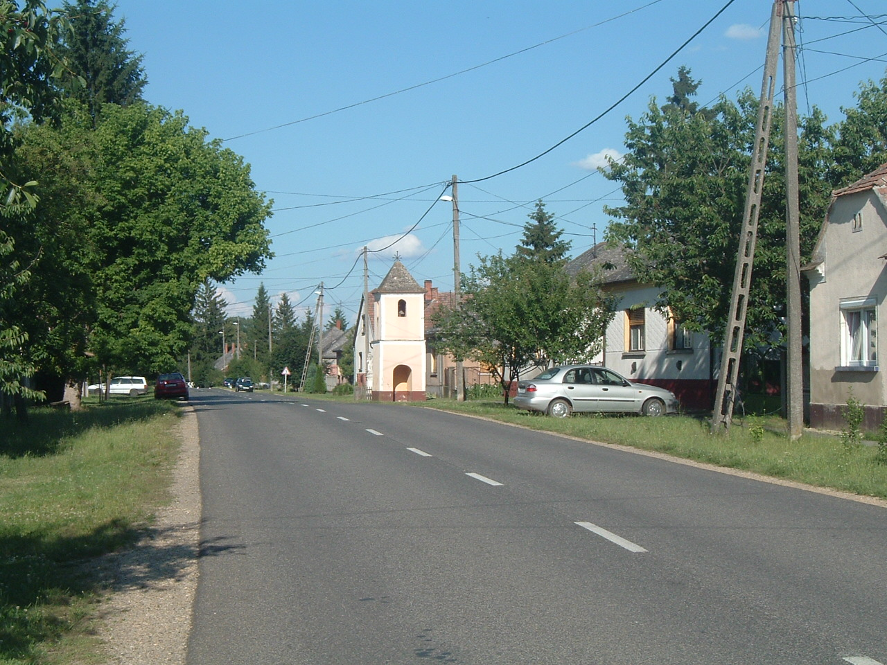 The Main street in Püspöki (Püspökmolnári), Hungary